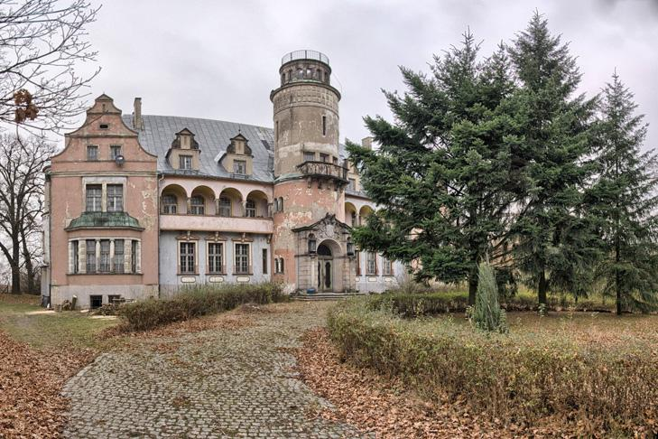 Roszkowice Pałac Fryderyka Hansa von Cramon – Taubadel